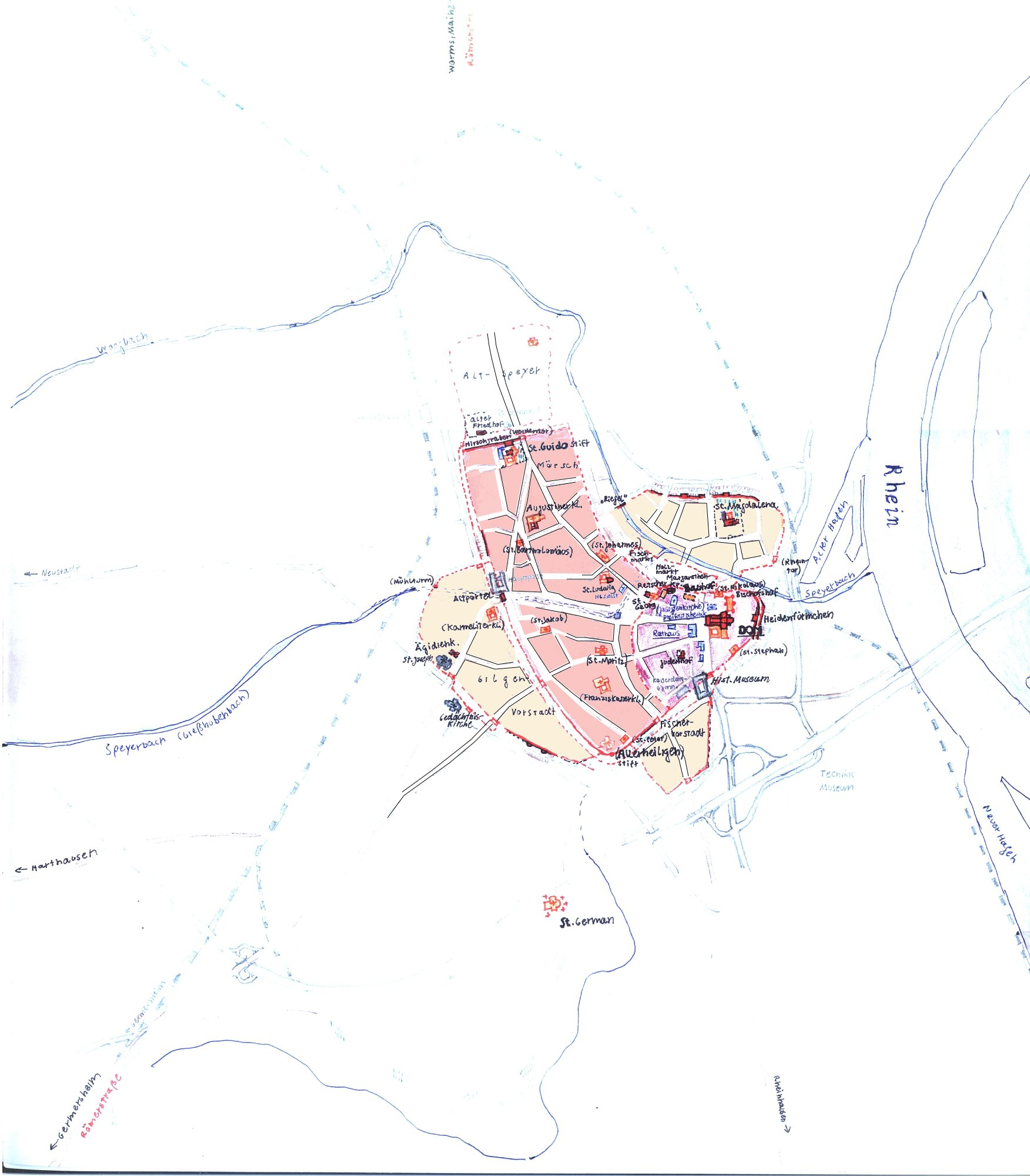 Entwicklung der Stadt Speyer (selbst gezeichnet auf Grundlage der TOP25 Karte des LVA): Violett = ältester Stadtkern, rötlich = Stadterweiterung bis zur Stauferzeit, gelblich = spätmittelalterliche Stadterweiterungen, eingezeichnete Gebäude - Rot = erhaltene mittelalterliche Bauten, Orange = abgegangene ma. Bauten, Blau = Barockbauten, Grau = Bauten des 19./20. Jh.